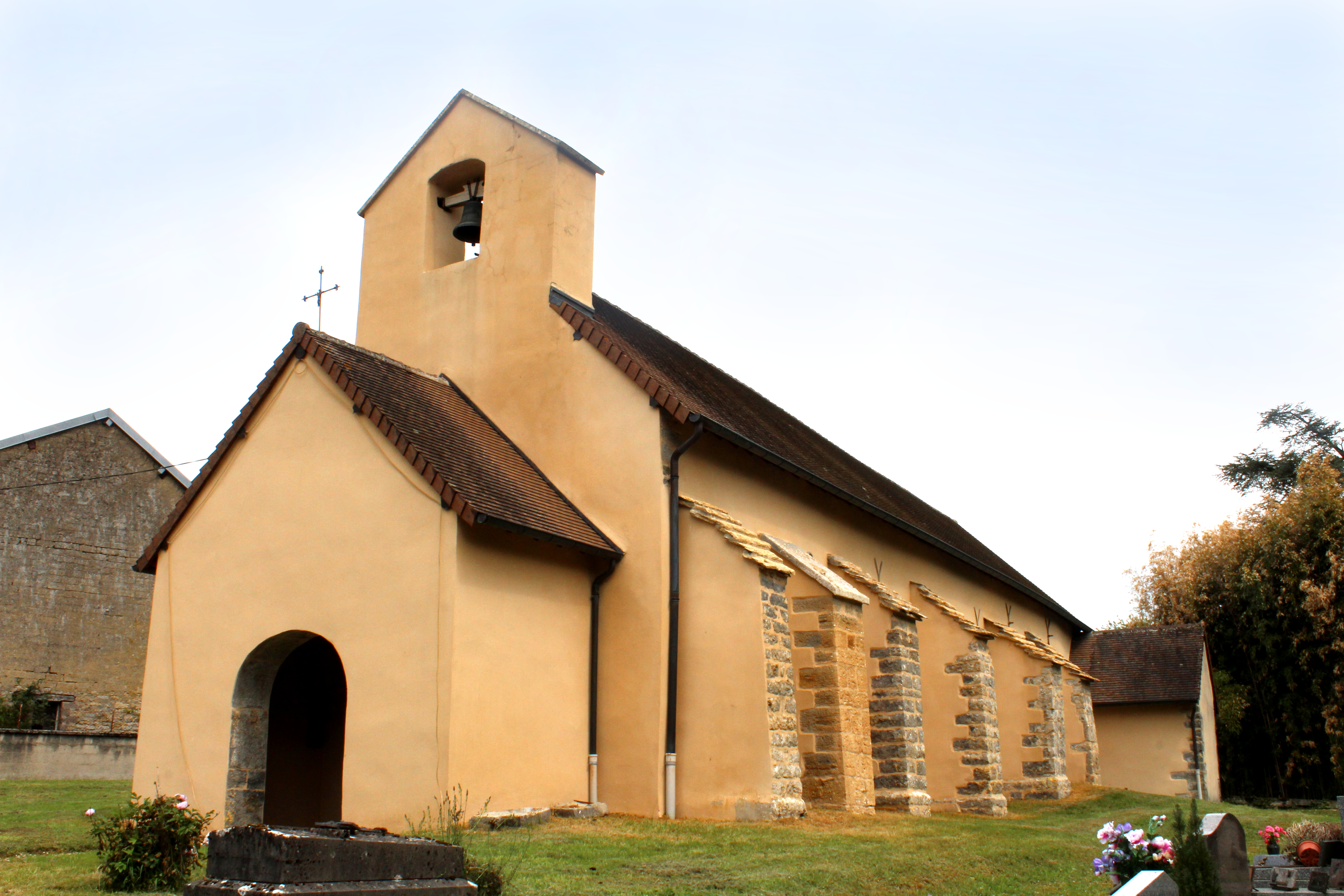 Église Saint-Philibert de Darbonnay.